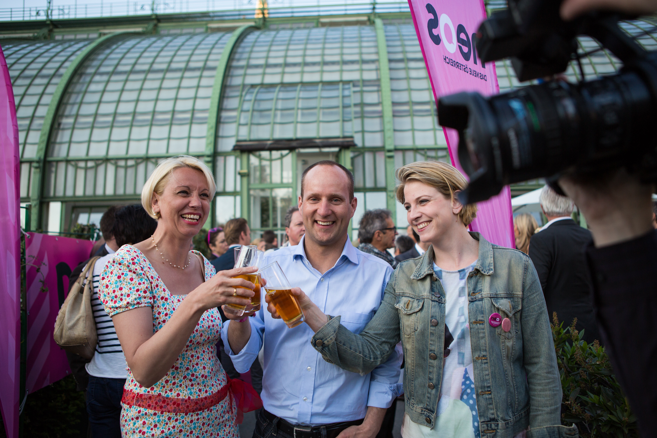 Matthias Strolz, Angelika Mlinar and Beate Meinl-Reisinger at the NEOS FEST in the Palmenhaus in Vienna